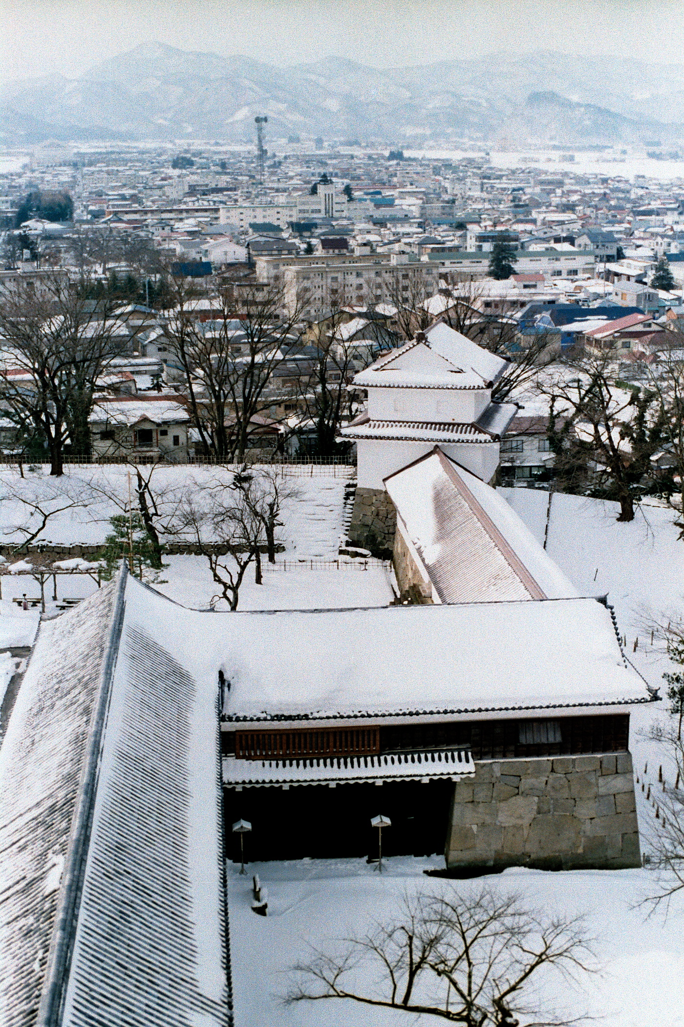 会津若松城雪景